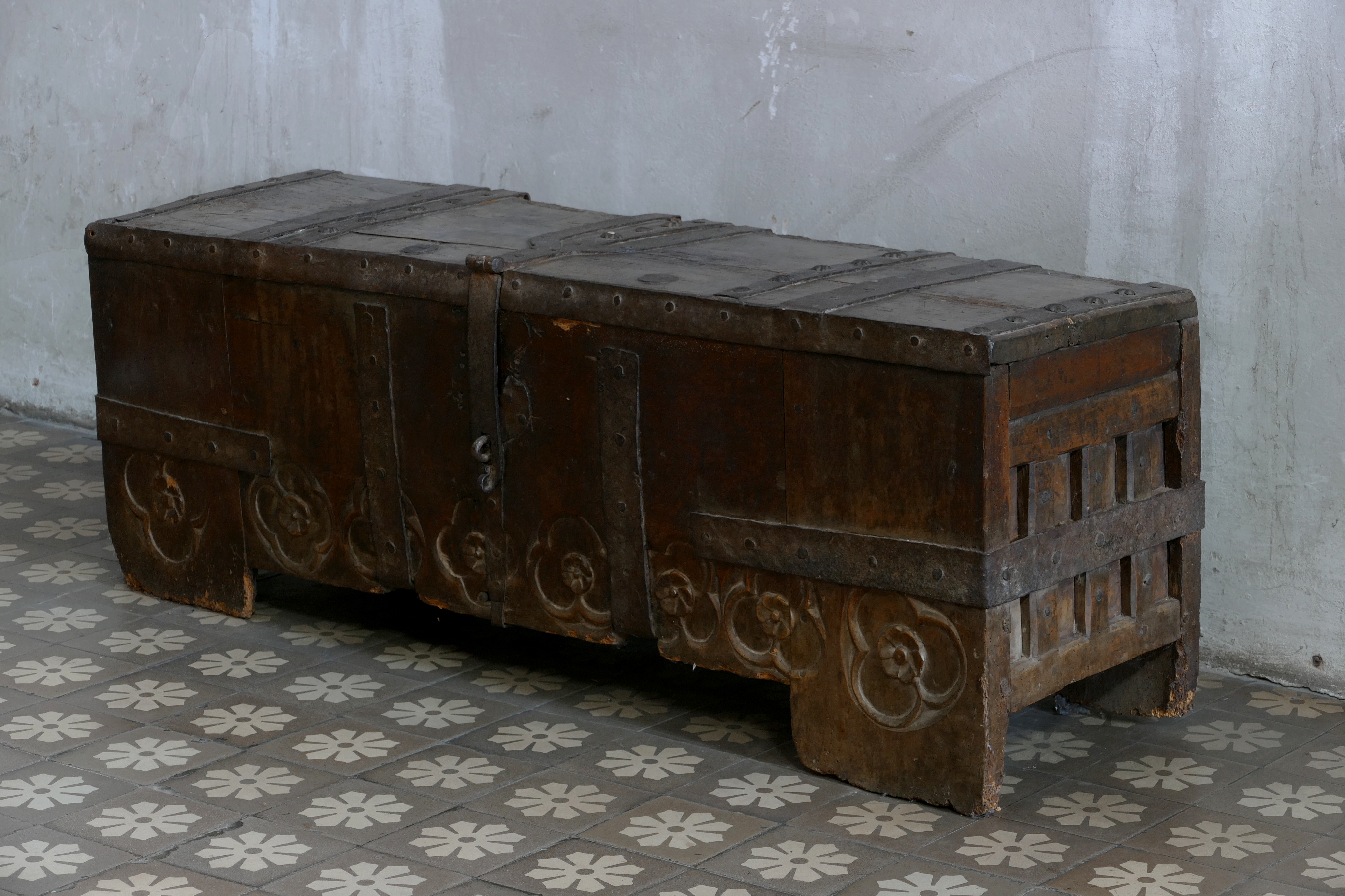 Alsace, Bas-Rhin, Wissembourg, Église abbatiale Saints-Pierre-et-Paul (PA00085247, IA67008036). Coffre médiéval (XIe au XIIIe): This object is inscrit Monument Historique in the base Palissy, database of the French furniture patrimony of the French ministry of culture, under the references PM67001477 and IM67011552.